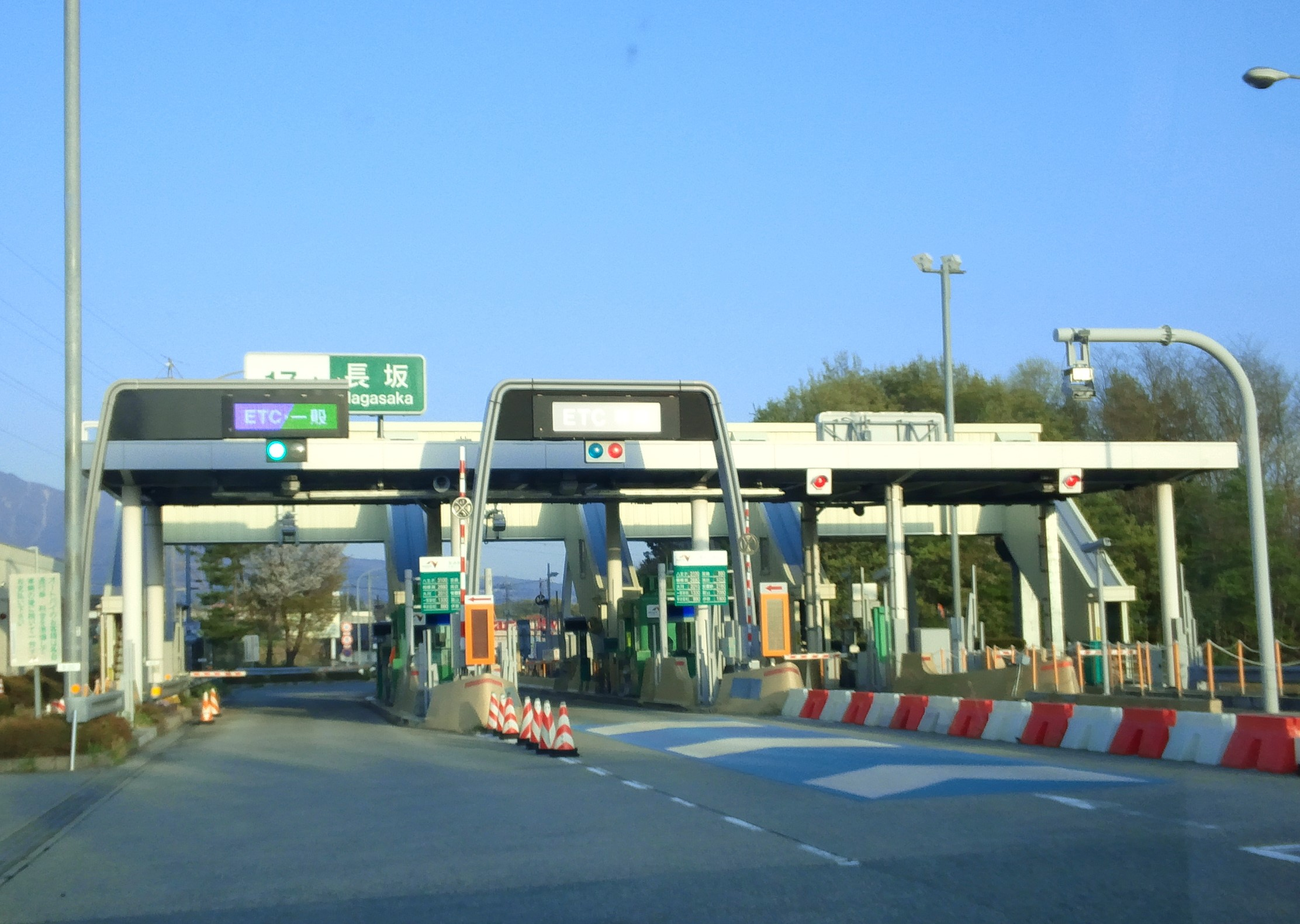 中央自動車道長坂インターチェンジ料金所